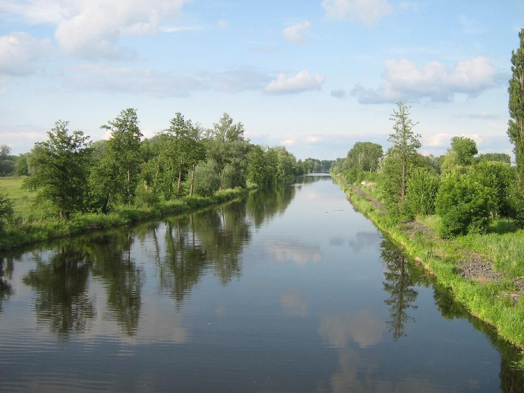 der Havelkanal kurz vor der Mündung im die Havel bei Paretz, Brandenburg (Germany).